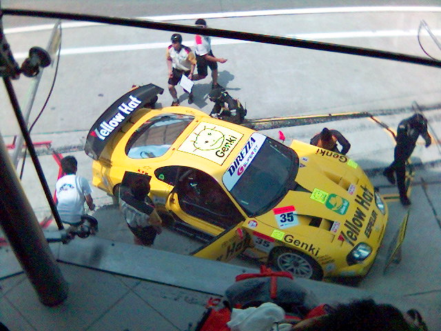 Super GT